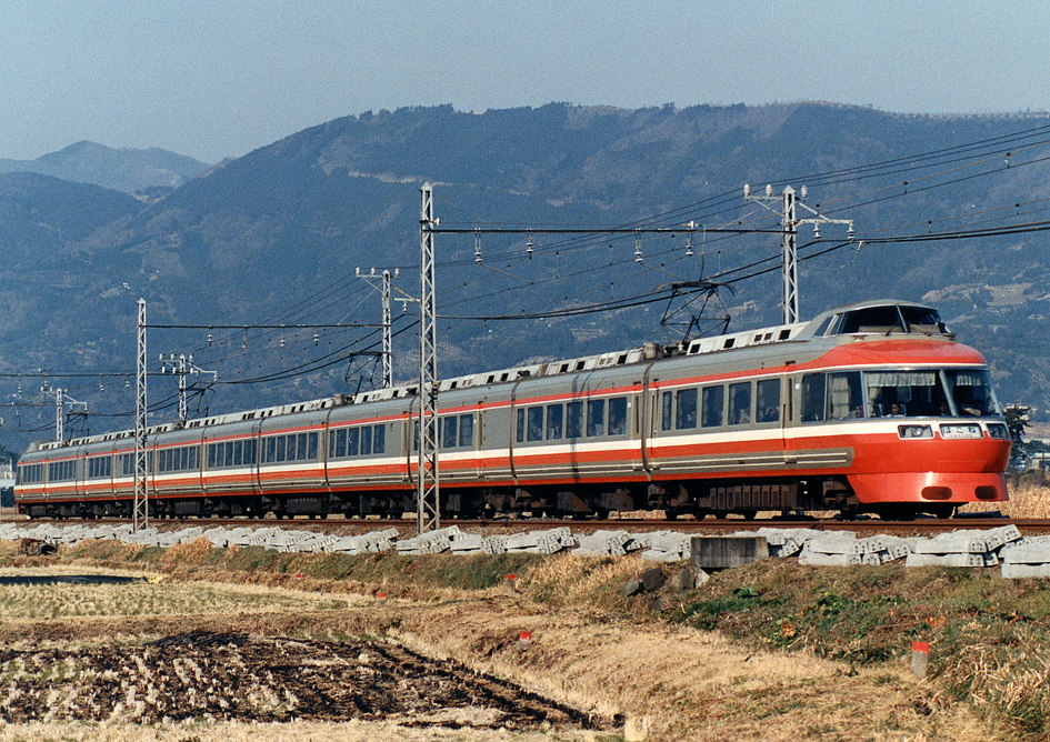 小田急電鉄 7000形電車 LSE はこね